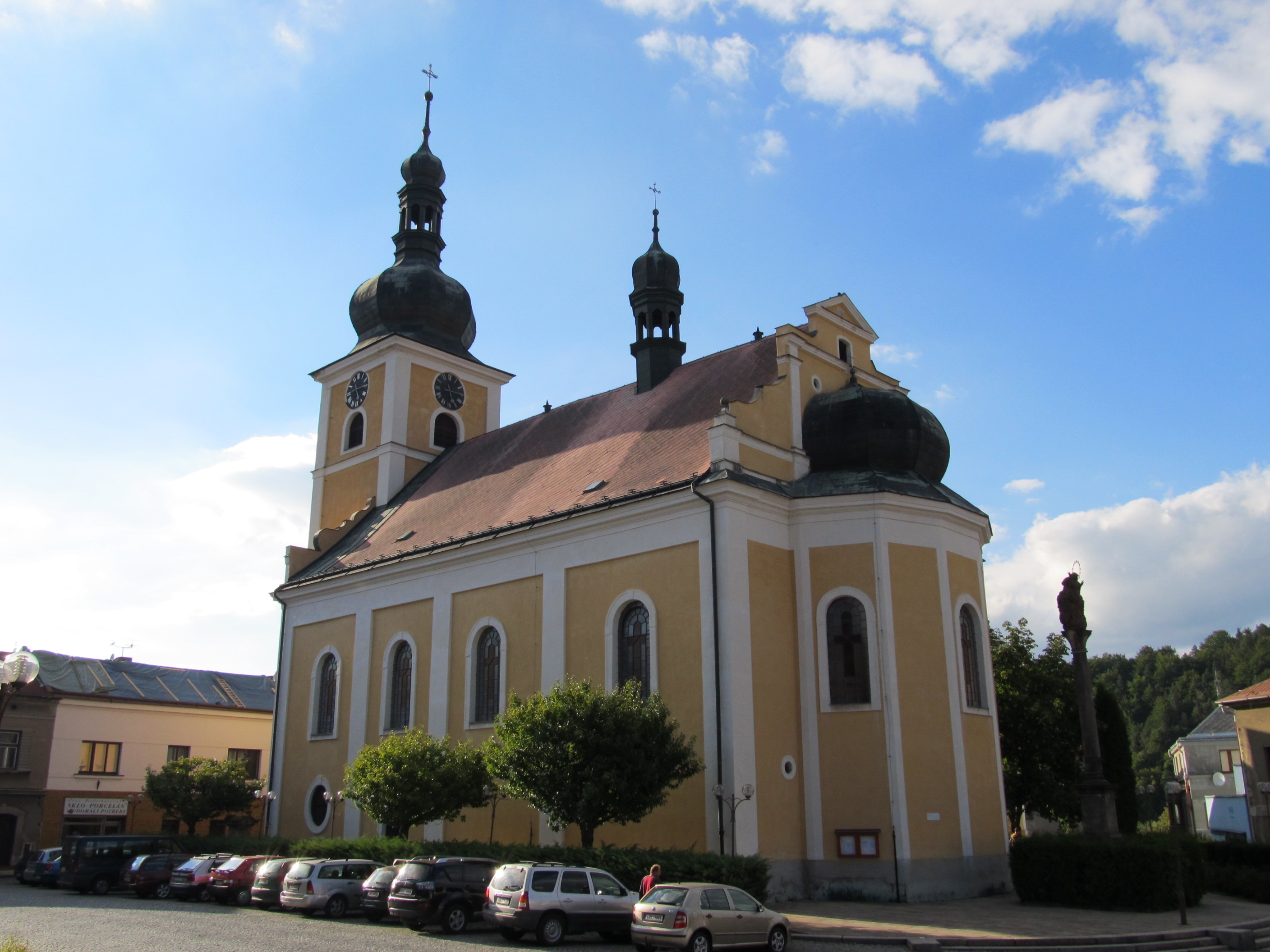 Kostel sv. Jakuba Většího, nám. T. G. Masaryka, Úpice